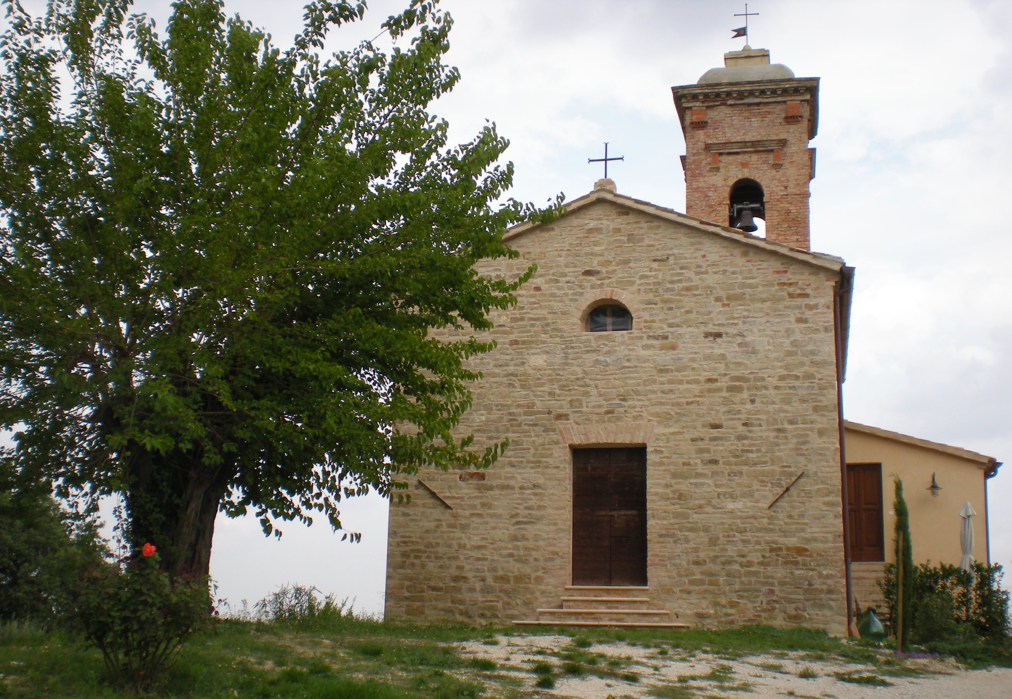 Chiesa di San Lorenzo in contrada San Lorenzo di Montecarotto.